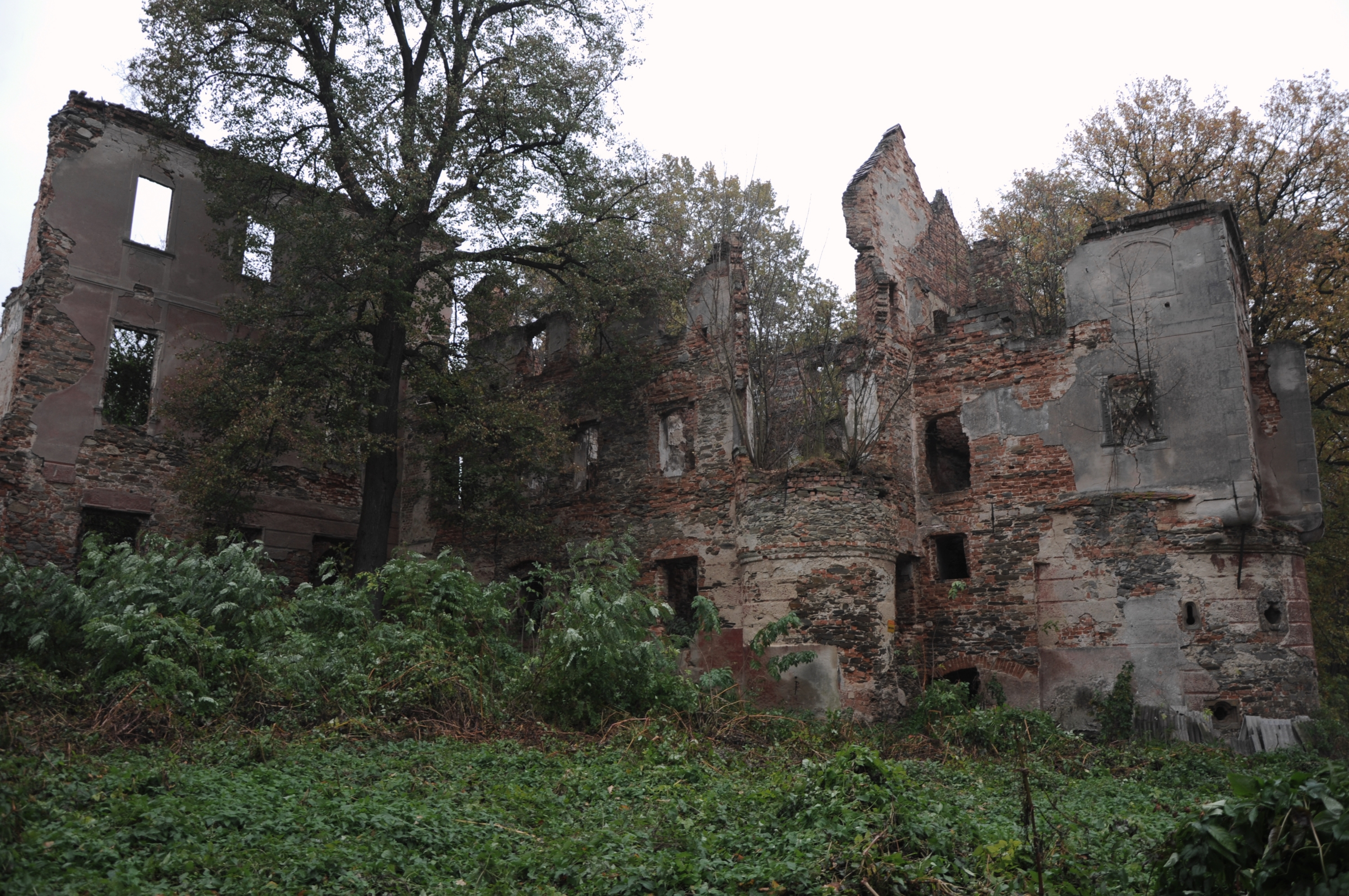 Pielaszkowice, ruiny pałacu, 1570, 1 poł. XVIII